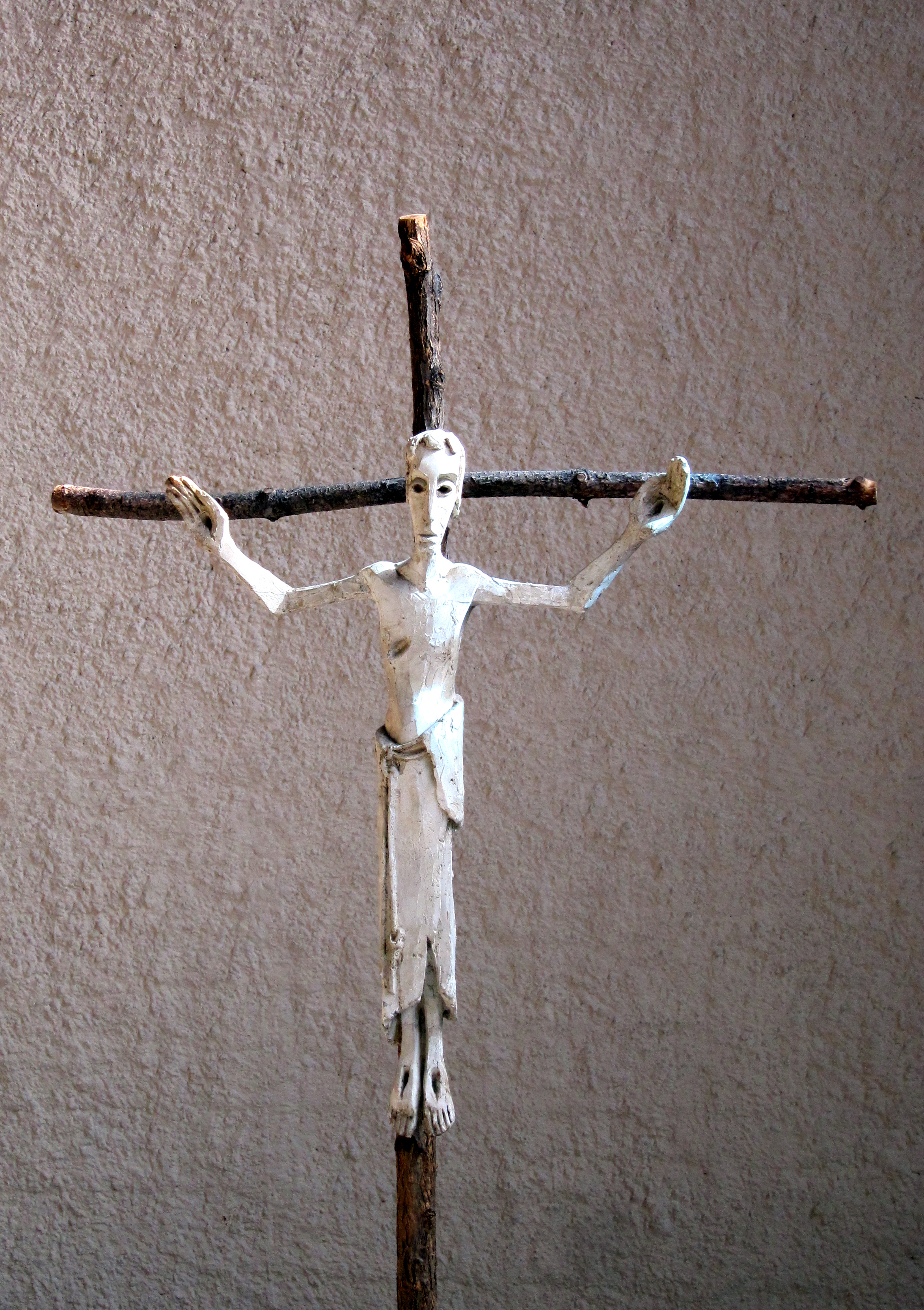 Römisch-katholische Kirche Bruder Klaus Basel, Kreuz von Albert Schilling